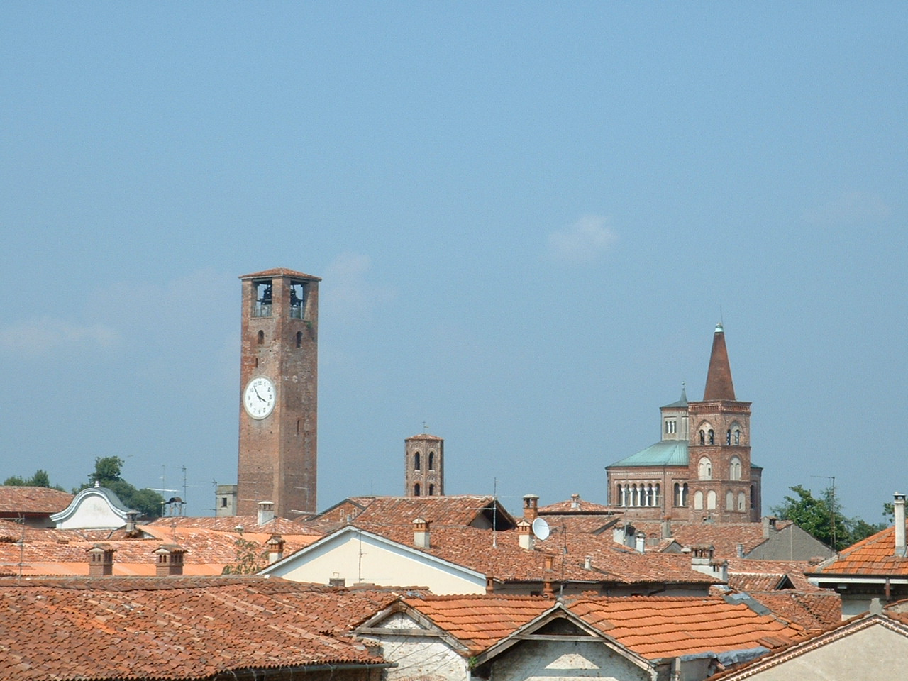 Panorama di Soncino